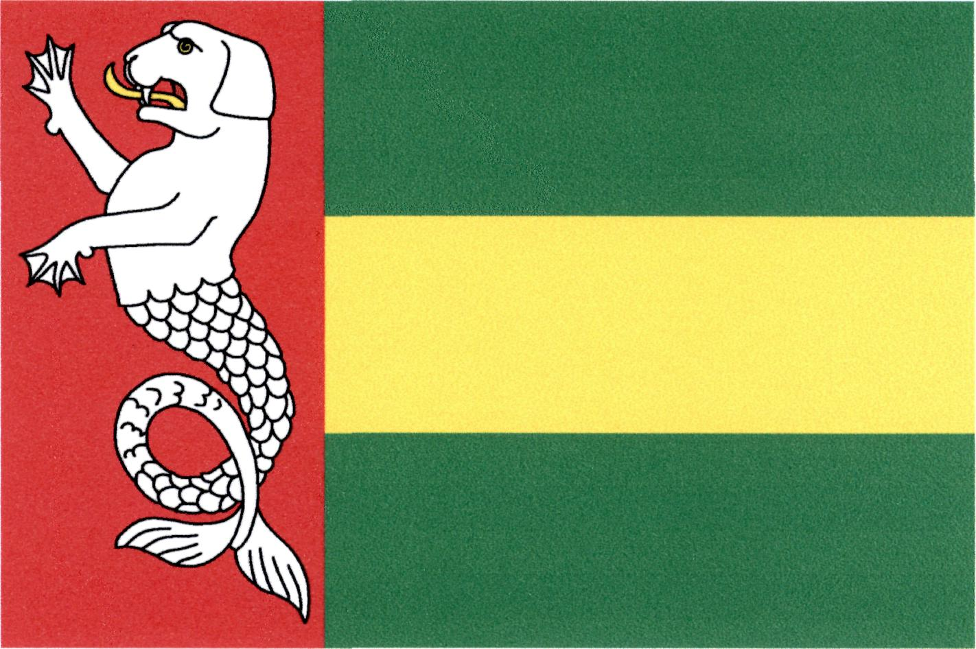 Vlajka obce Bezděkov (okres Havlíčkův Brod)